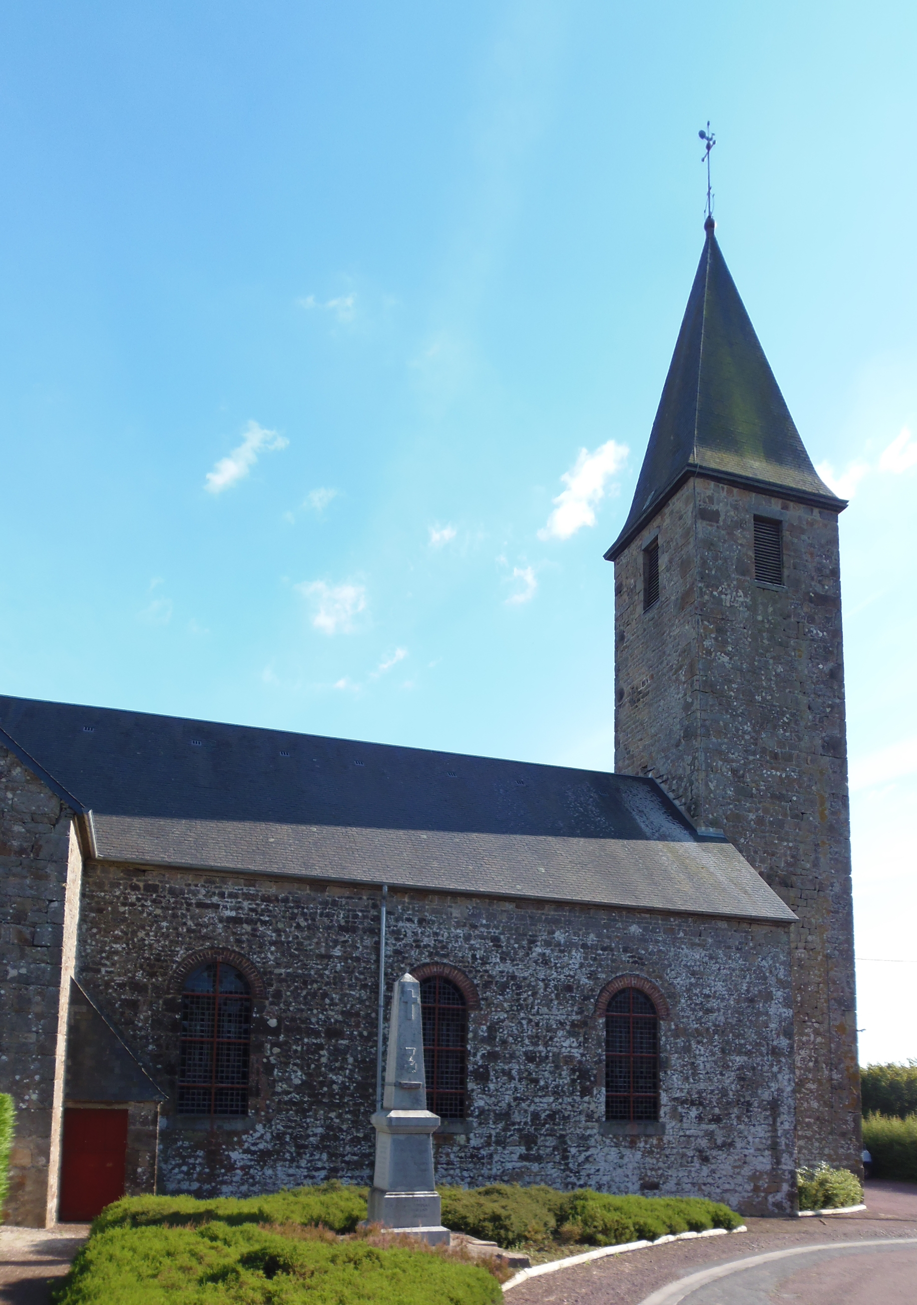 Saint-Jean-des-Bois (Normandie, France). L'église Saint-Jean-Baptiste.